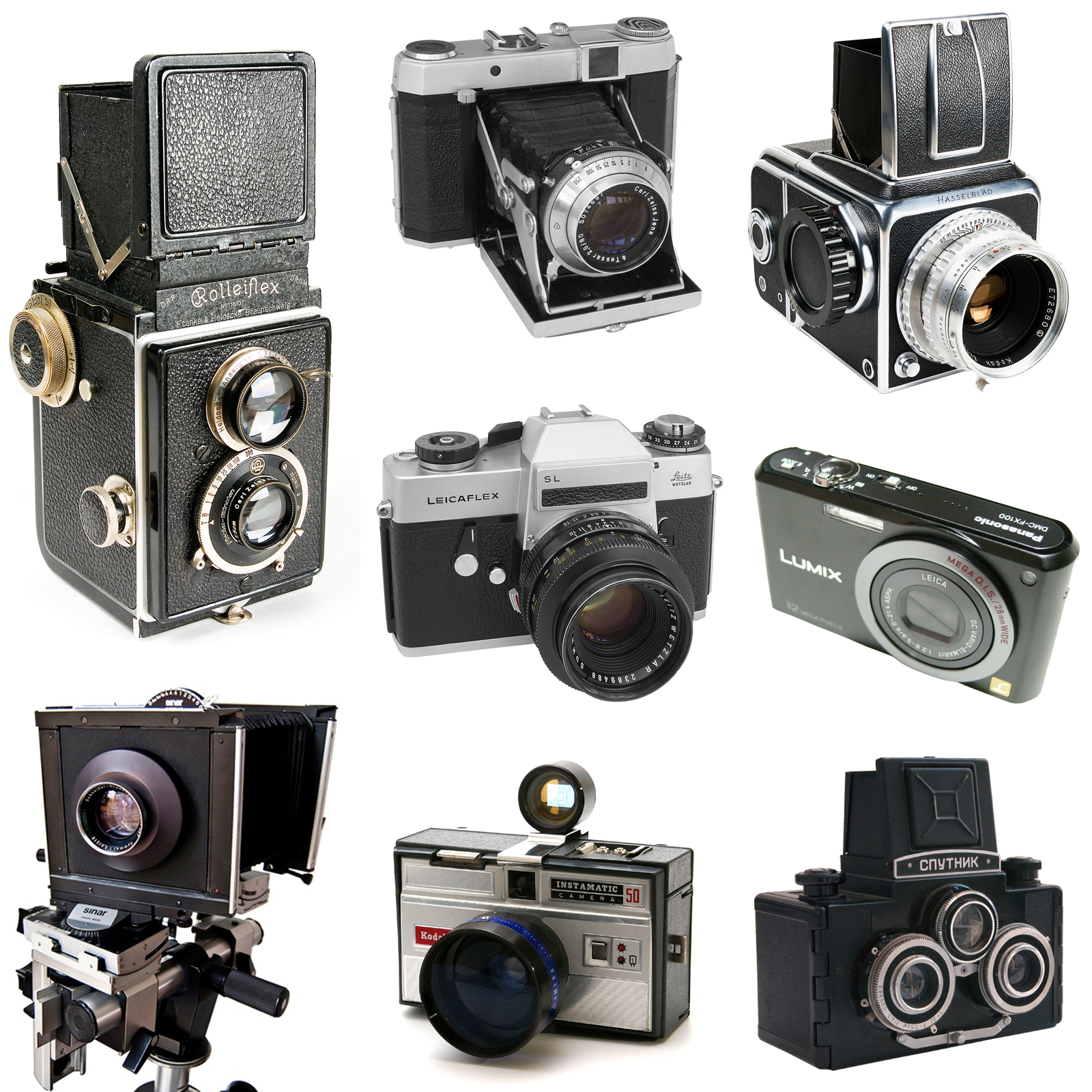 Eight cameras.